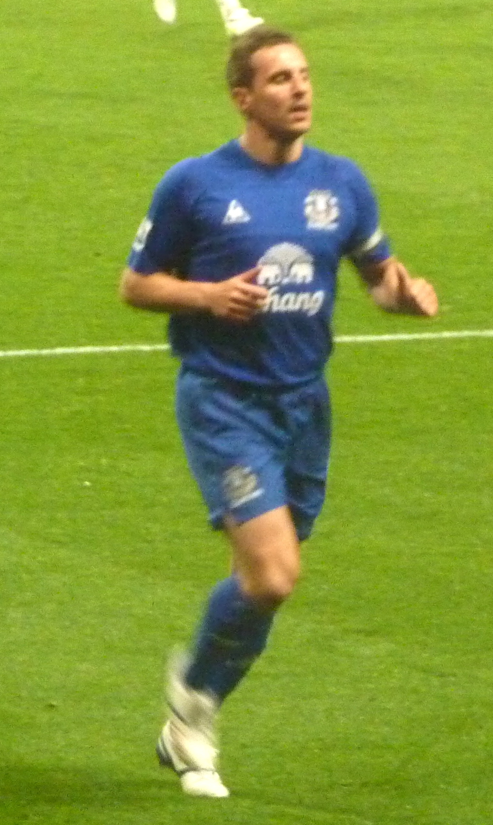 Phil Jagielka.